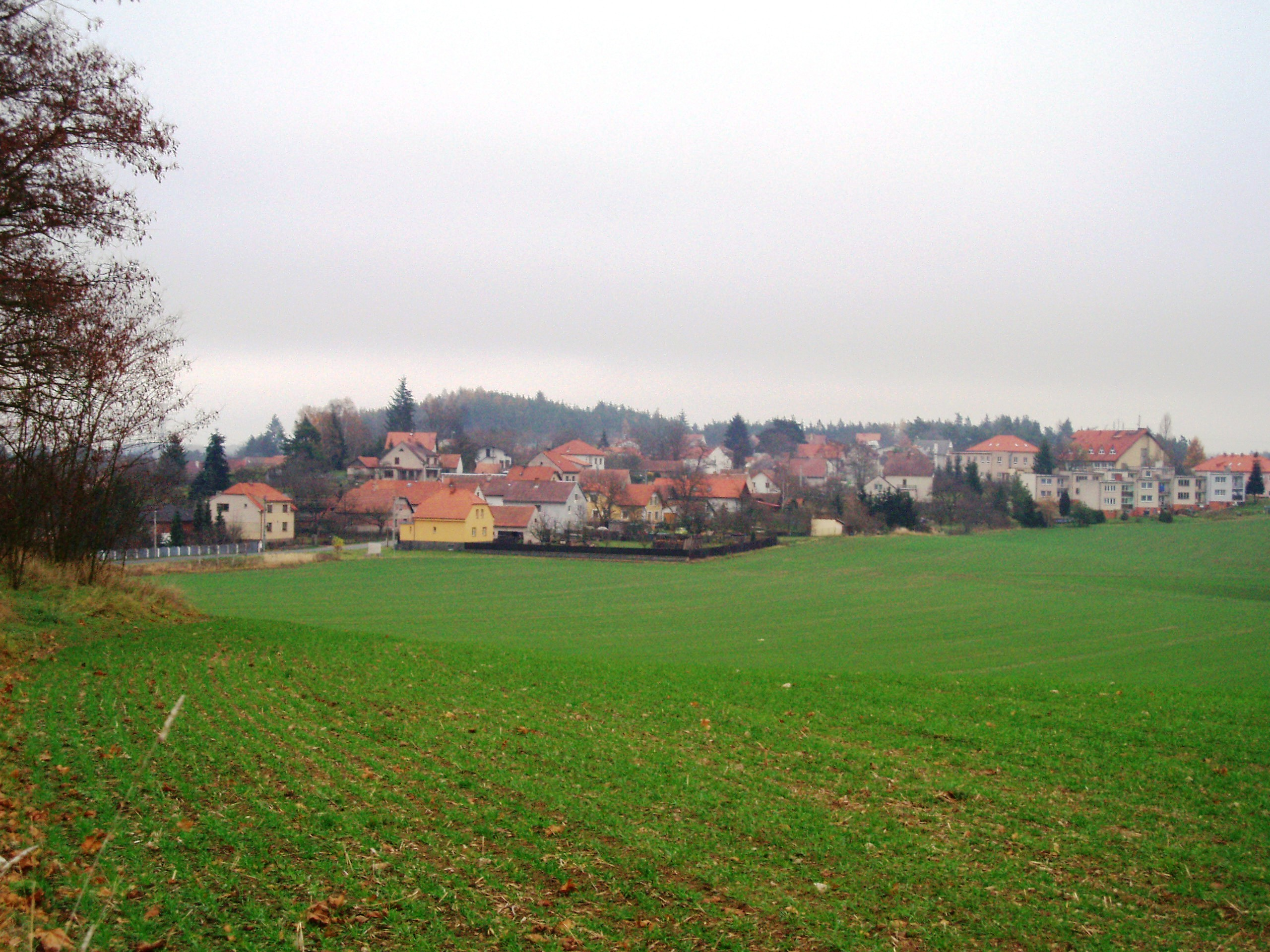 Nečíň - celkový pohled